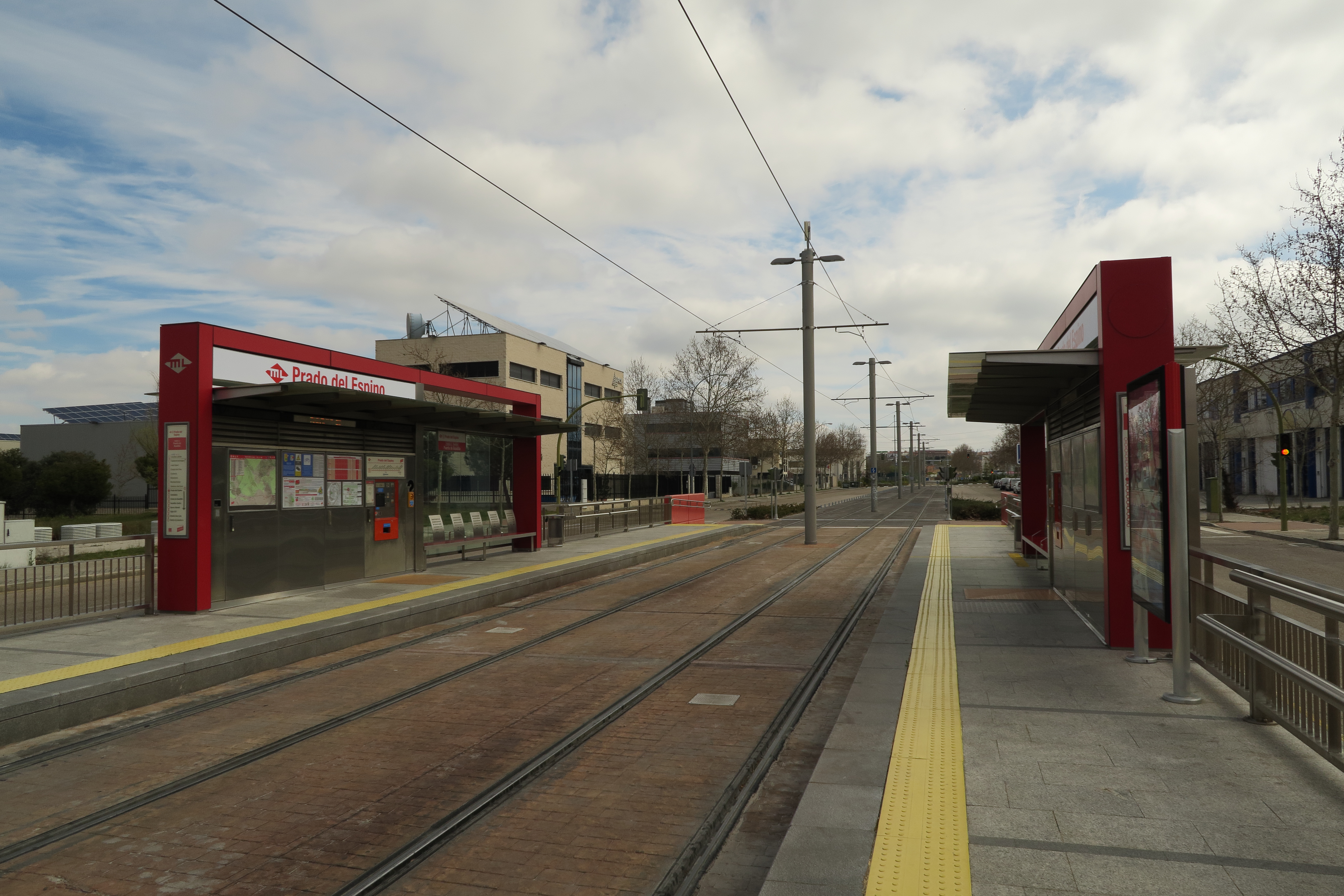 Estación de Prado del Espino